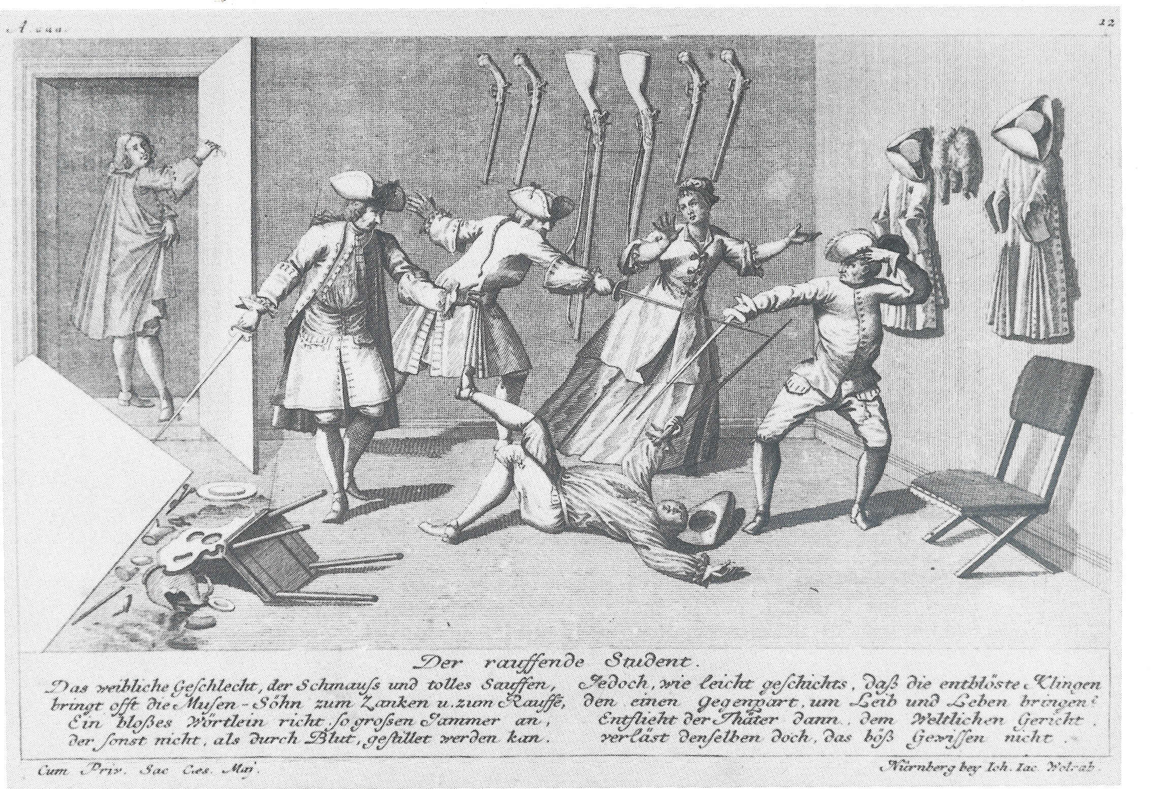 Dendrono (Johann Georg Puschner) - "Der rauffende Student" um 1725 Der rauffende Student Das weibliche Geschlecht, der Schmauss und tolles Sauffen, bringt offt die Musen-Söhn zum Zanken u. zum Rauffen, Ein bloßes Wörtlein richt so grossen Jammer an, der sonst nicht, als durch Blut, gestillet werden kan. Jedoch wie leicht geschichts, daß die entblösten Klingen den einen Gegenpart, um Leib und Leben bringen? Entflieht der Thäter dann, dem Weltlichen Gericht, verläst denselben doch, das böß Gewissen nicht. Kupferstich von 1725, Rechte abgelaufen, PUBLIC DOMAIN